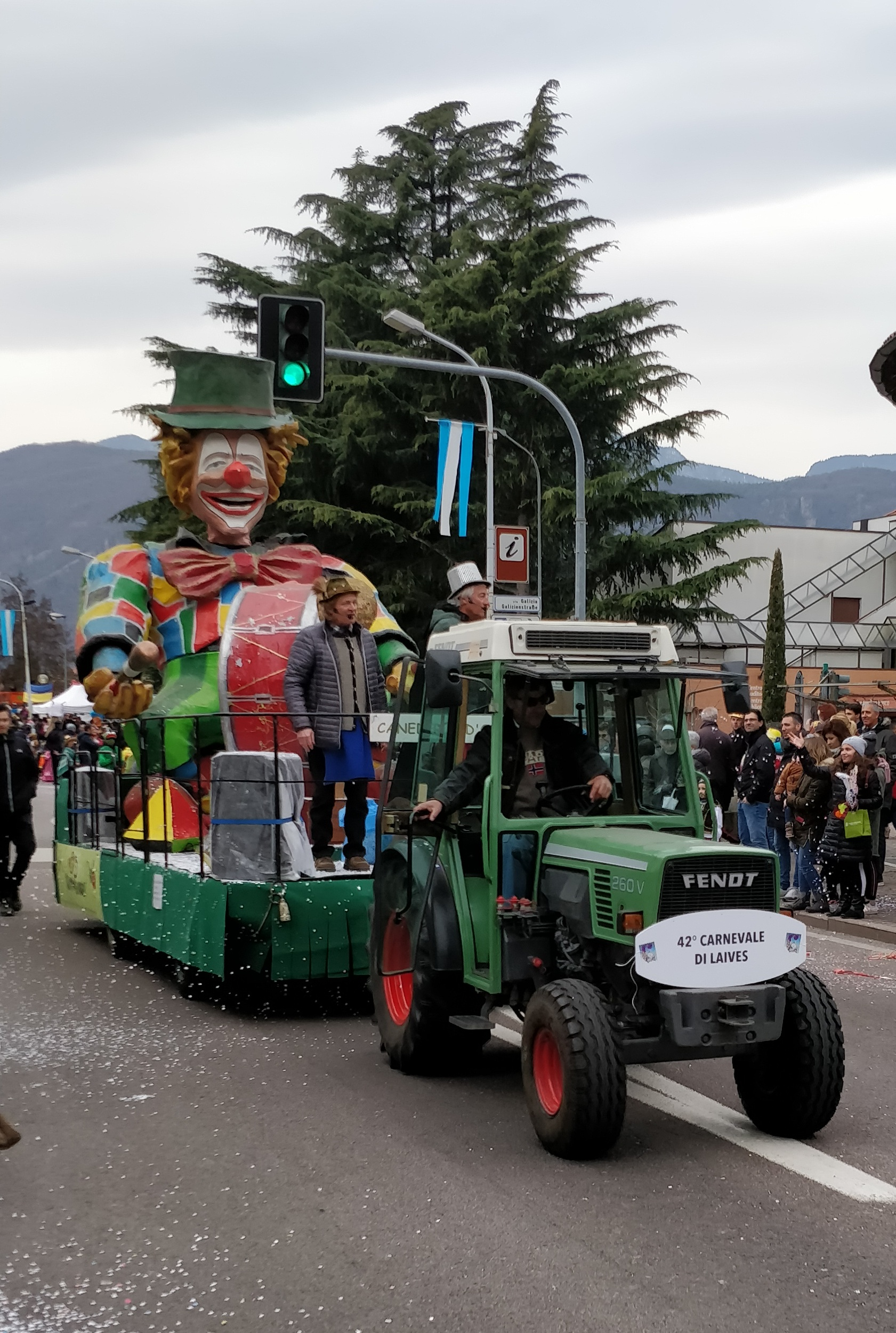 Il carro del Canederlo d'oro che tradizionalmente apre la sfilata dei carri allegorici del Carnevale di Laives. A bordo si trovano i presentatori (nell'occasione il duo comico Franz e Bepi)